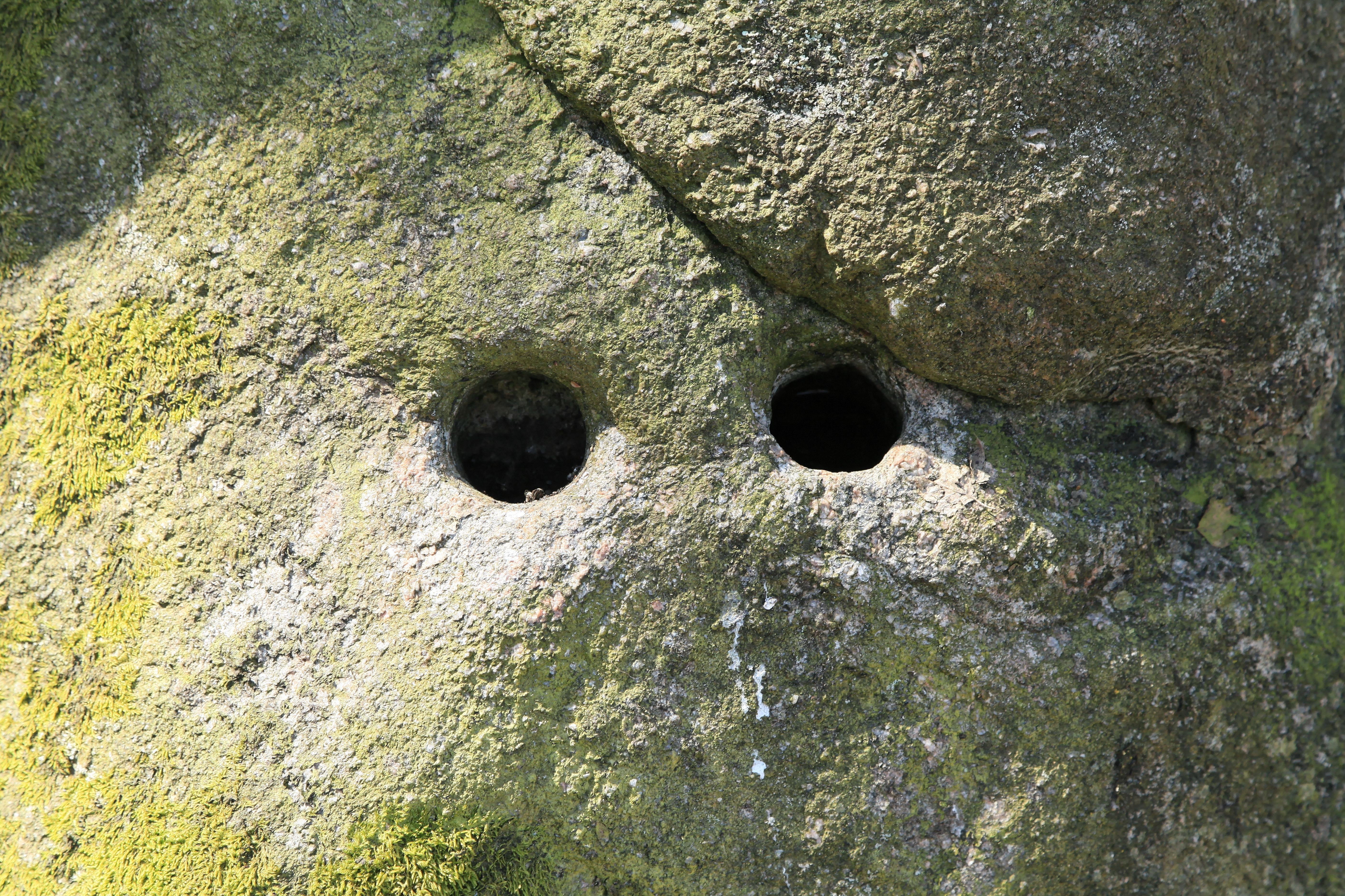 Großsteingrab Auf Bruneforths Esch, Berßener Straße in Stavern